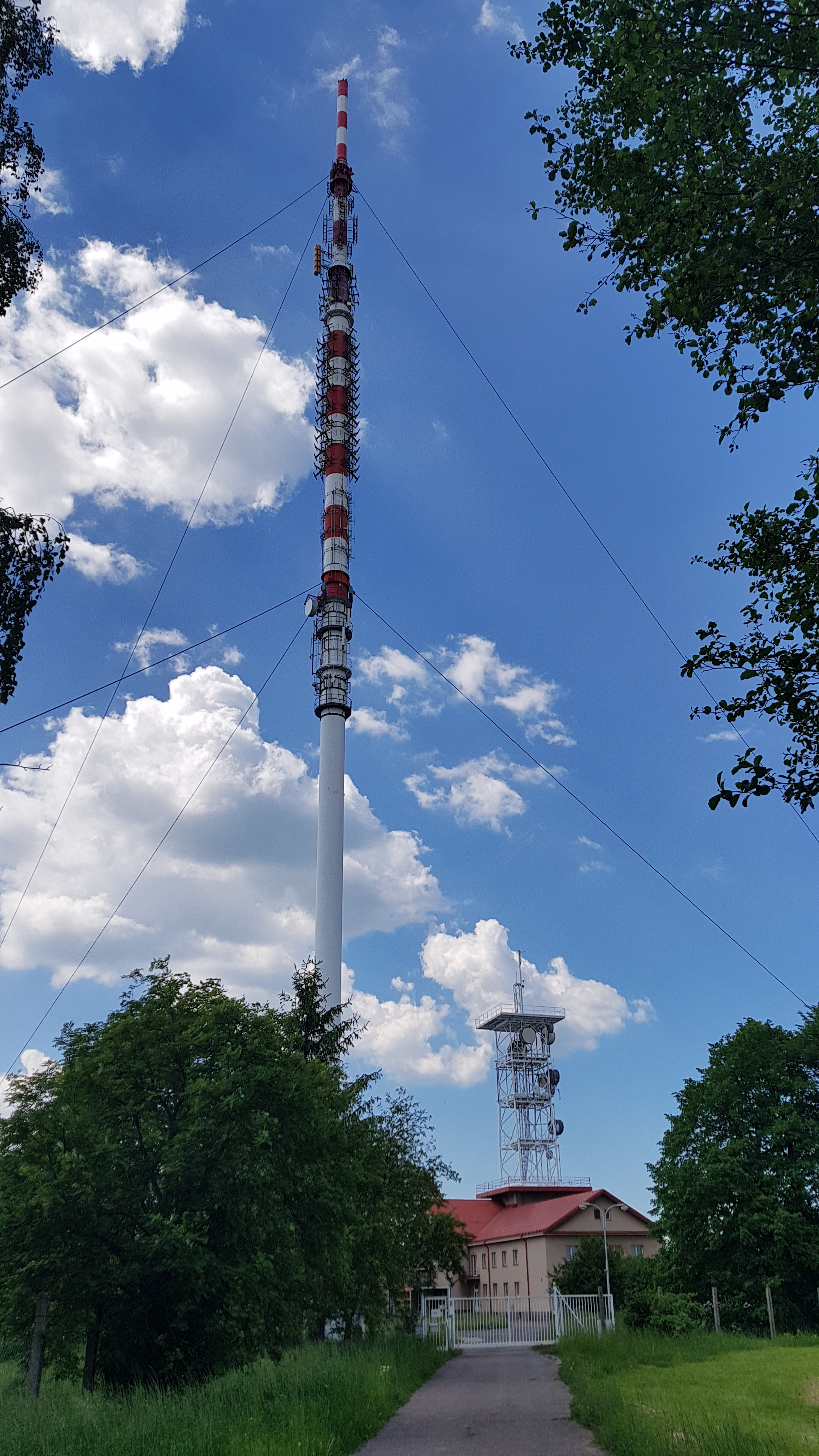 Televizní a rozhlasový vysílač Krásné